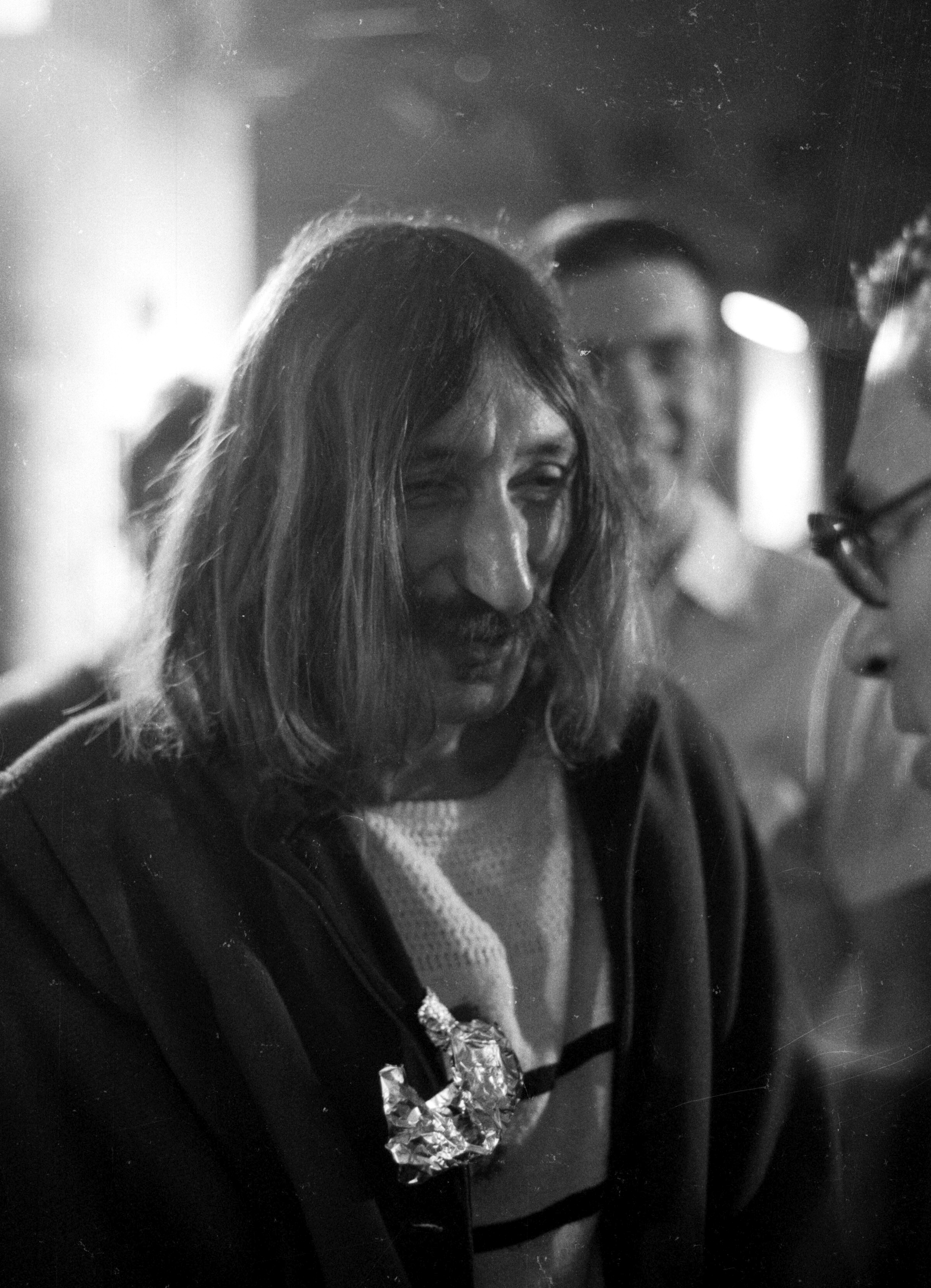 Waszlavik László, zenész, rocksámán